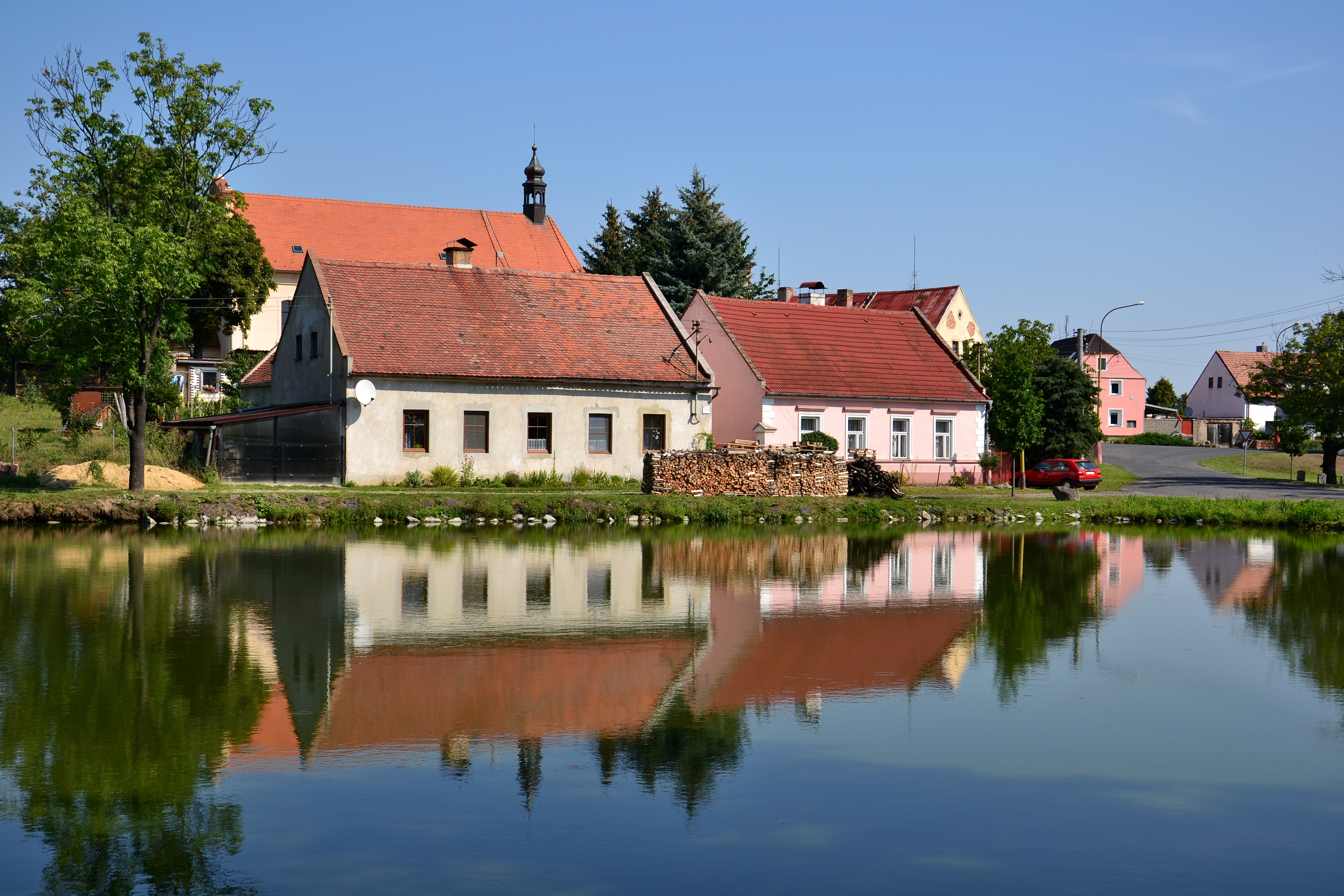 Domy mezi kostelem a rybníkem